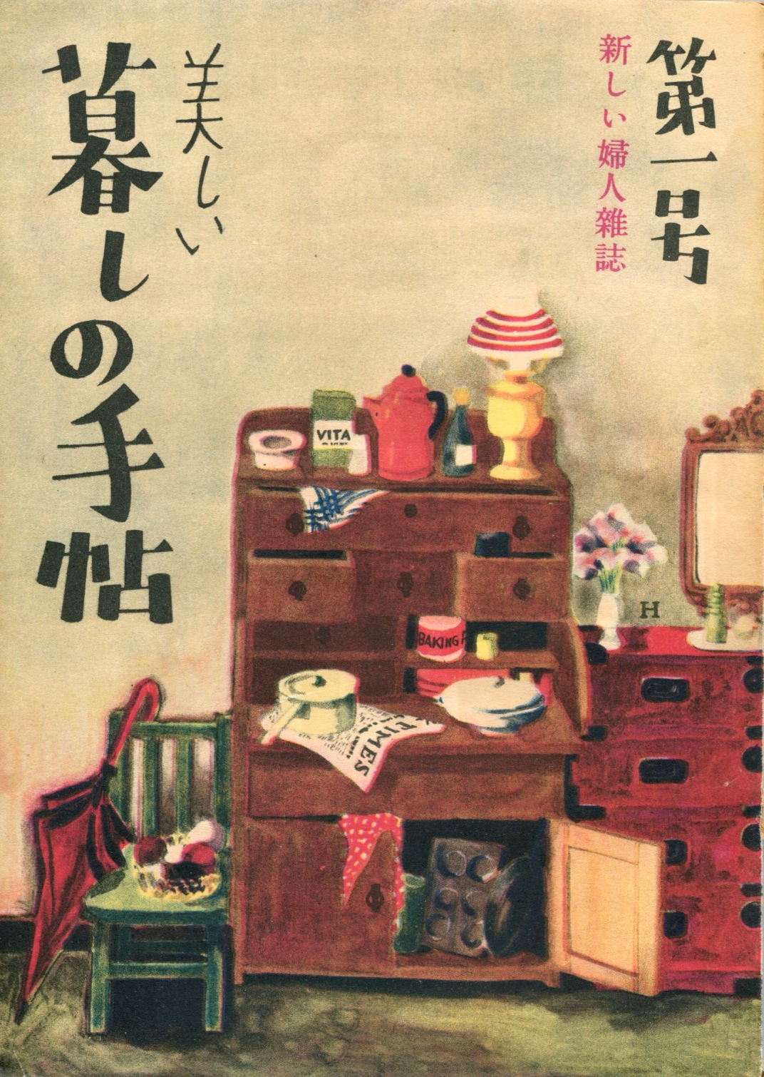 『暮しの手帖』1世紀 1号